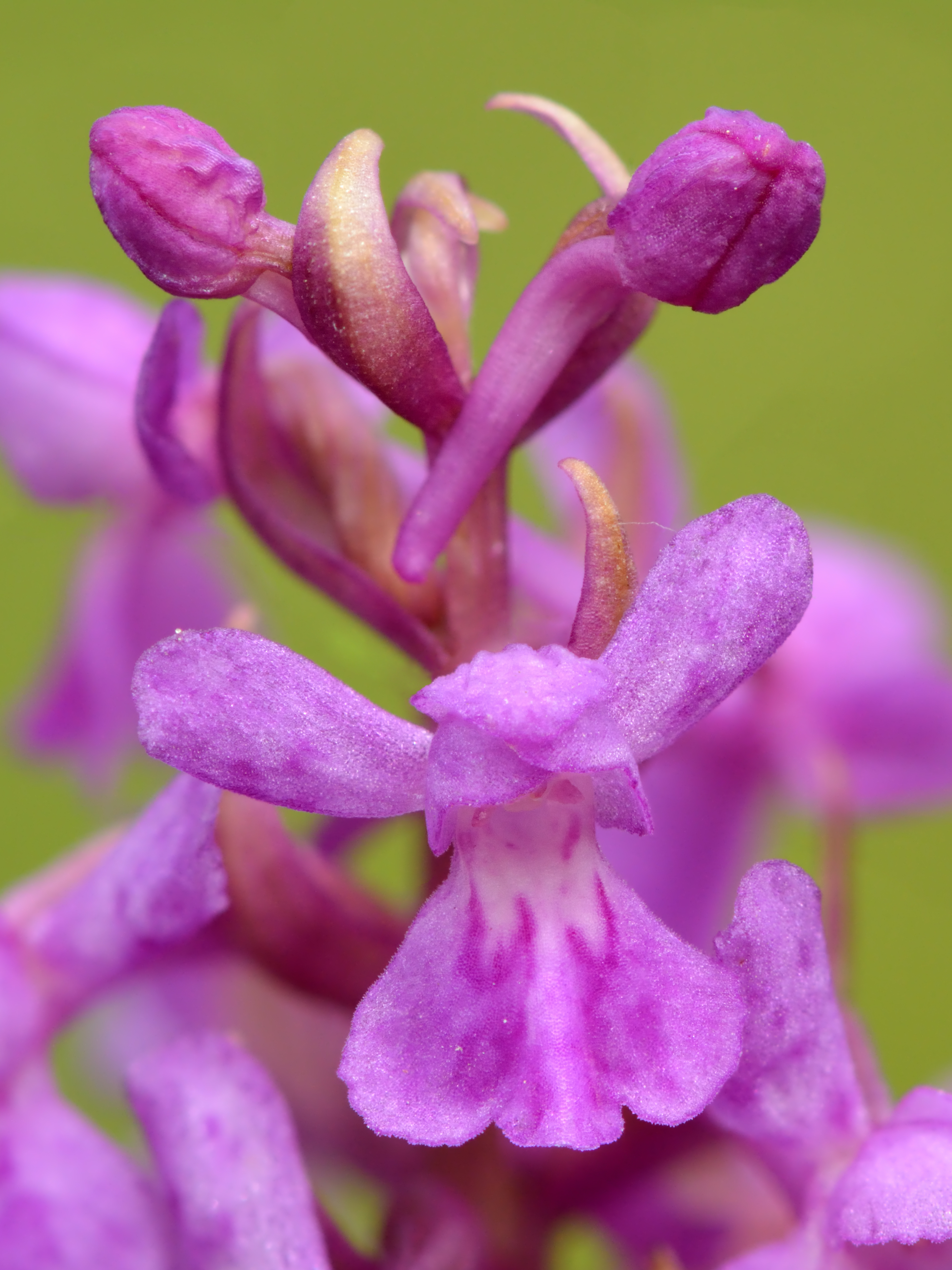 Käoraamatu ja sõrmkäpa hübriid. Niitvälja soo, Loode-Eesti.